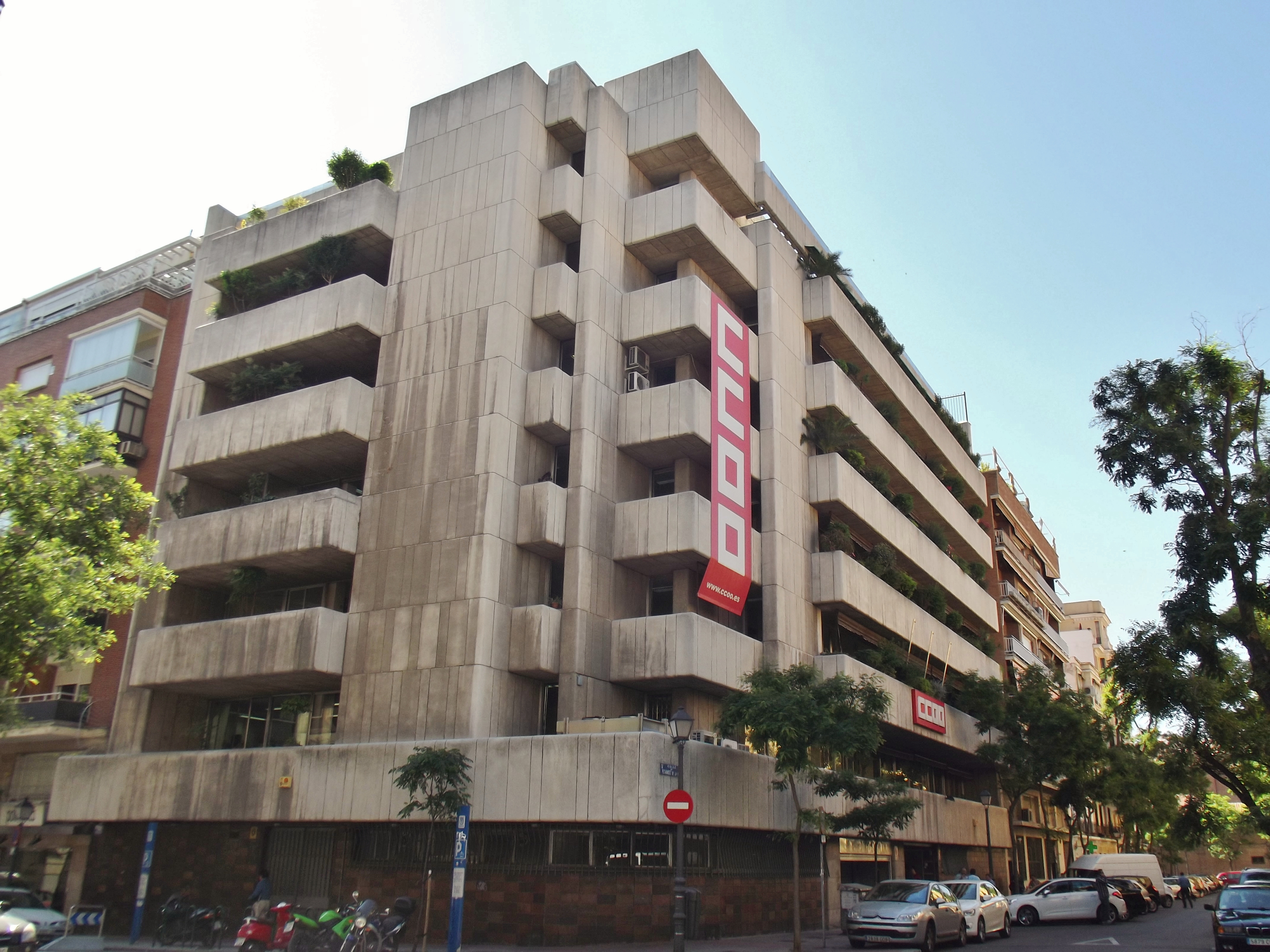 Esquina de Calle Caracas y Calle Fernández de la Hoz. Sede de Comisiones Obreras en Madrid.